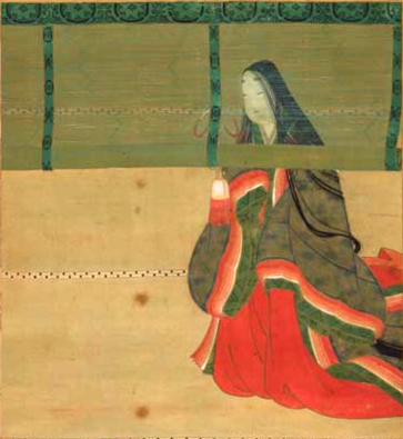 清少納言 Sei Shōnagon